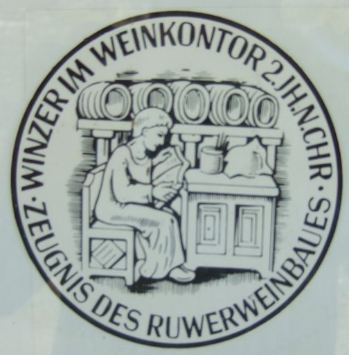 Winzer im Weinkontor am Lehrpfad Ruwertal